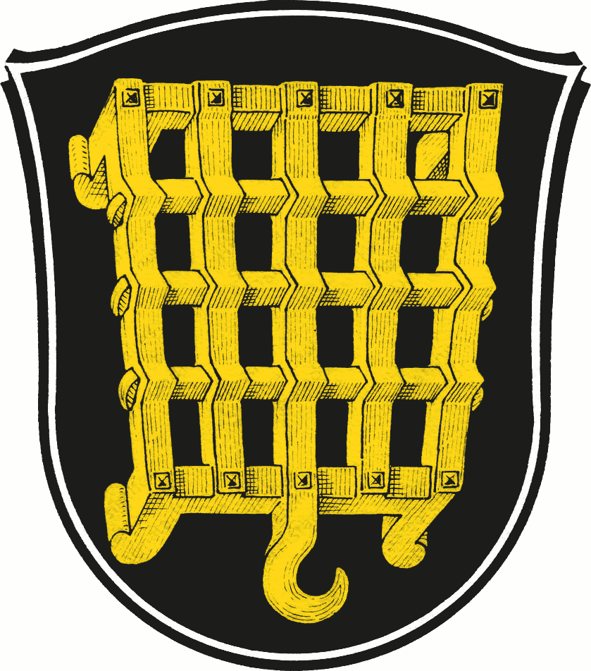 Wappen von Wald-Michelbach